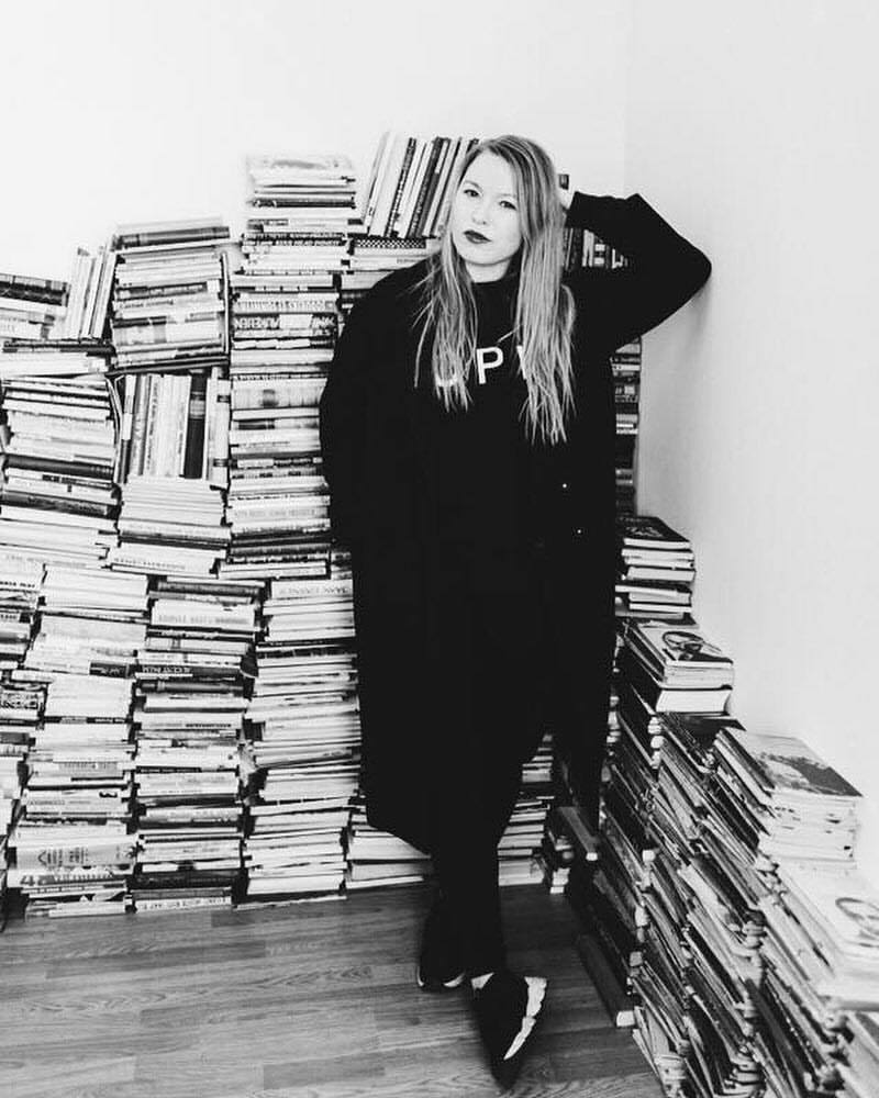 Keiti Vilms